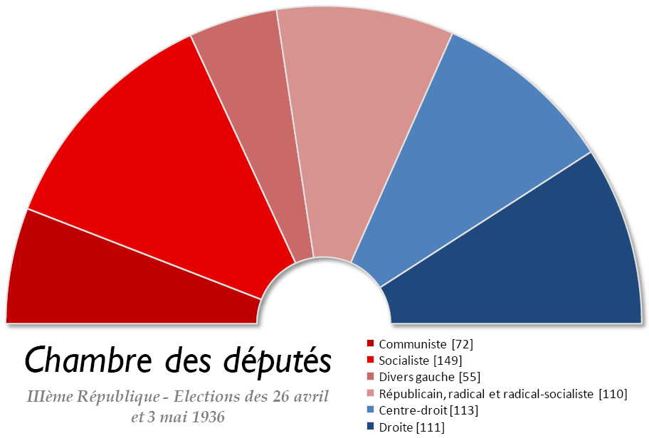 Chambre des députés française issue des élections législatives de 1936